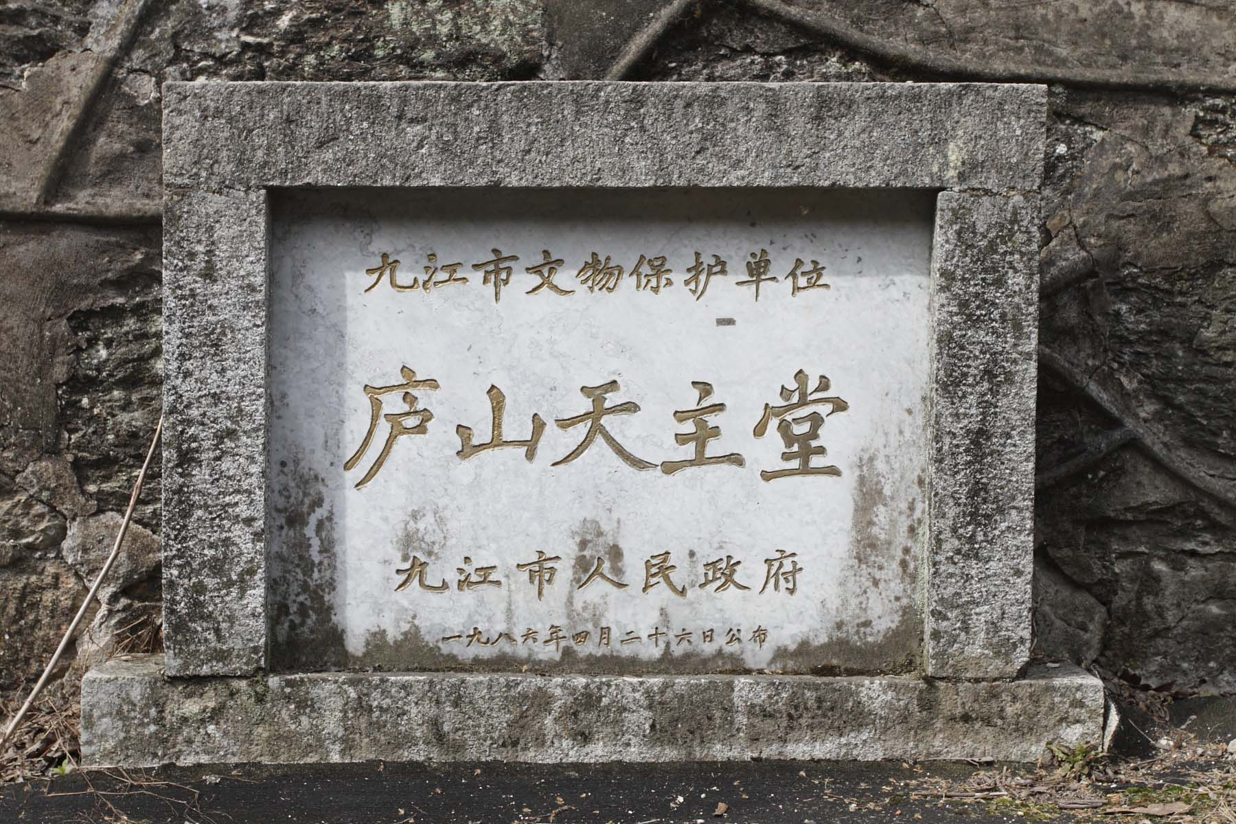 江西庐山天主堂，九江市文物保护单位